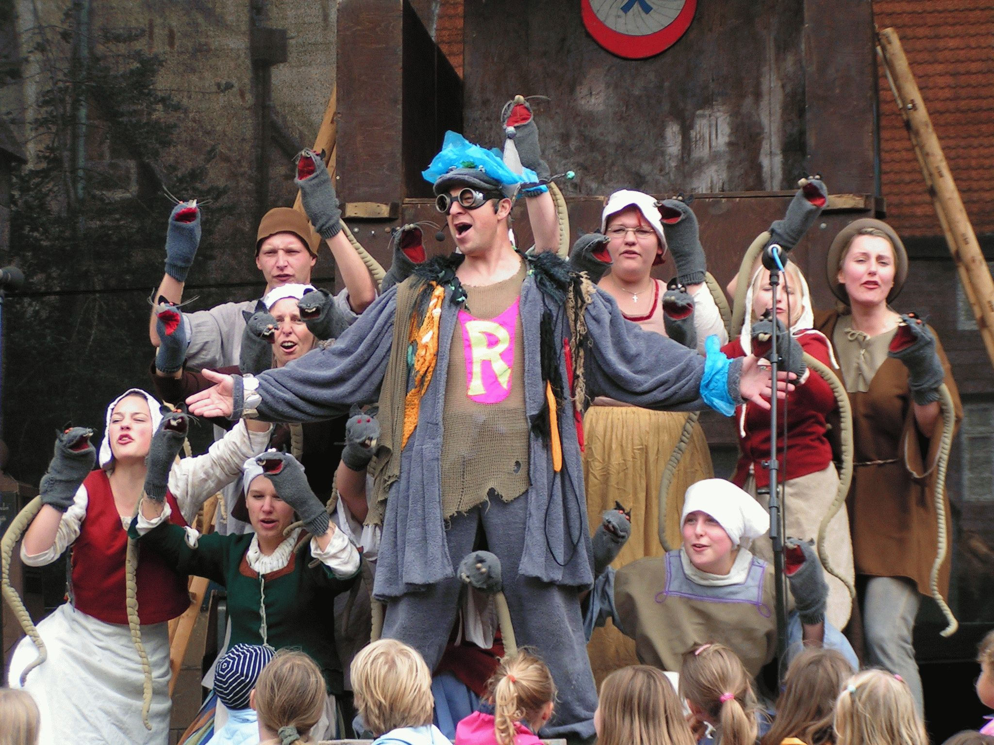 Musical RATS - im Sommer jeden Mittwoch um 16.30 Uhr in Hameln